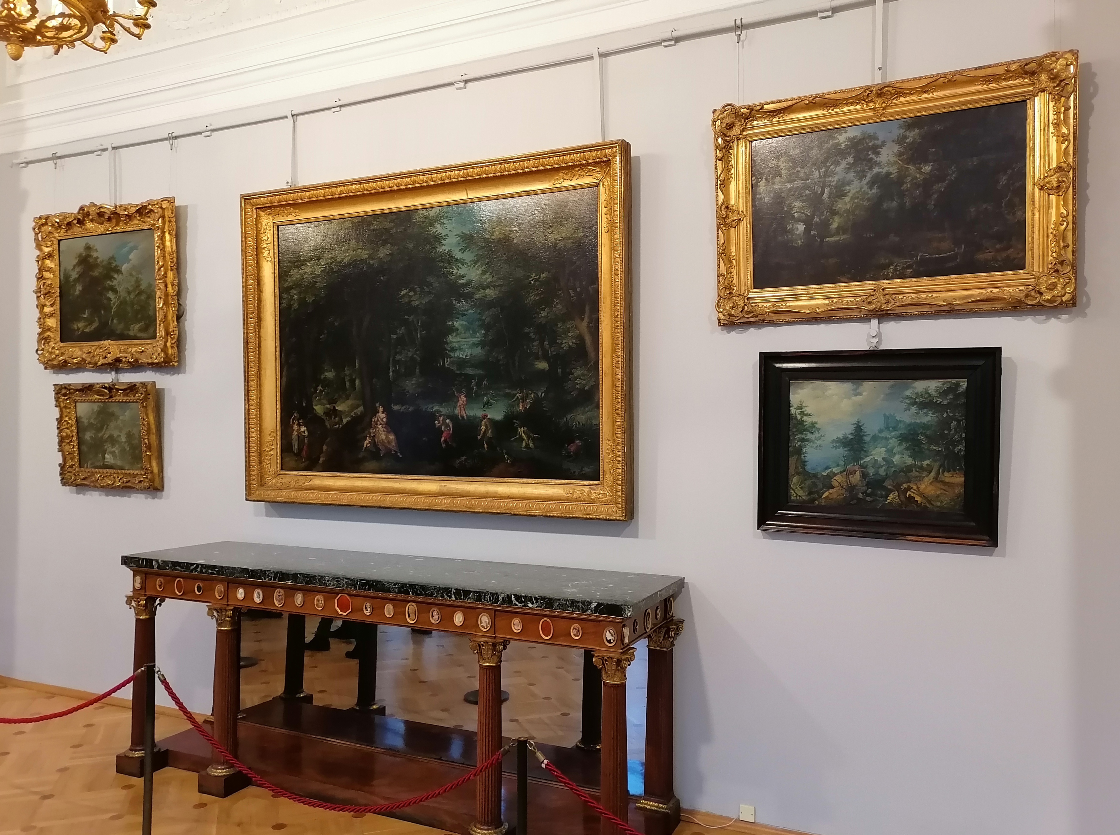 Малый Эрмитаж - зал 258